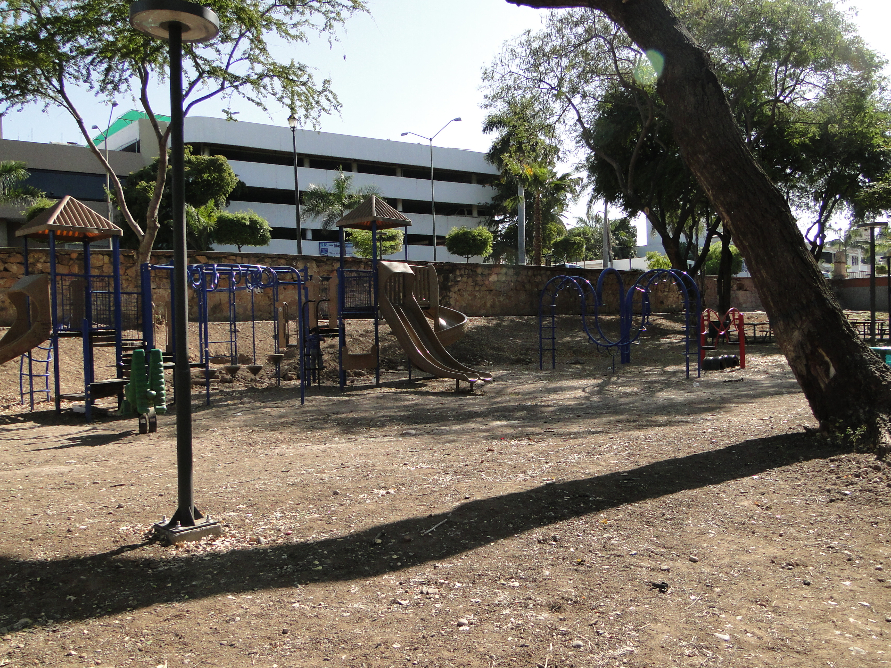 Parque las riveras, parque gratuito por el gobierno de Culiacán.